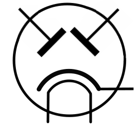 symbol of dual diode vacuum tube